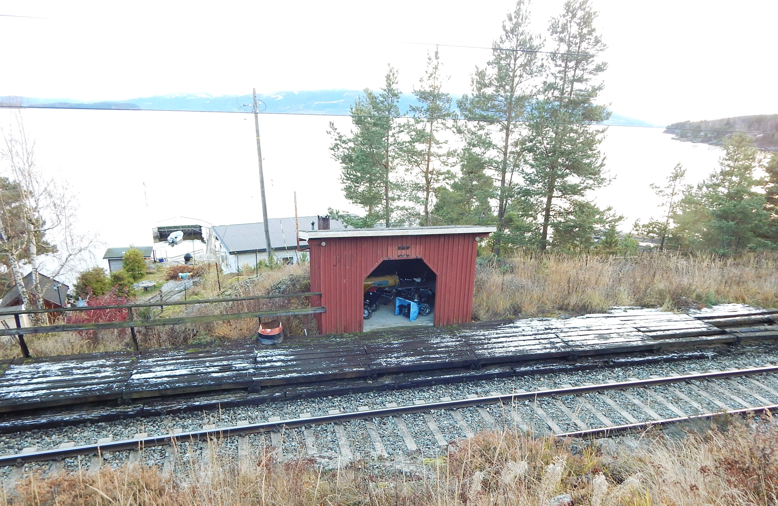 Tangen holdeplass på Randsfjordbanen